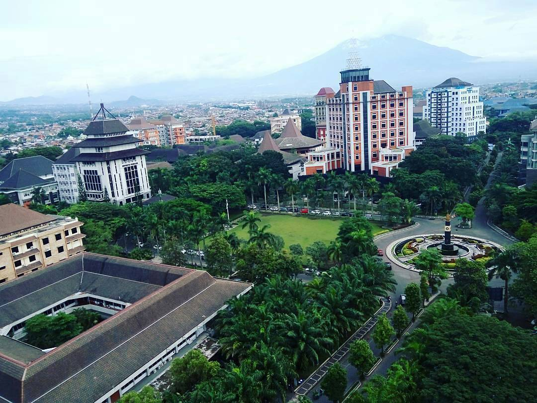 UB by MalangTODAY